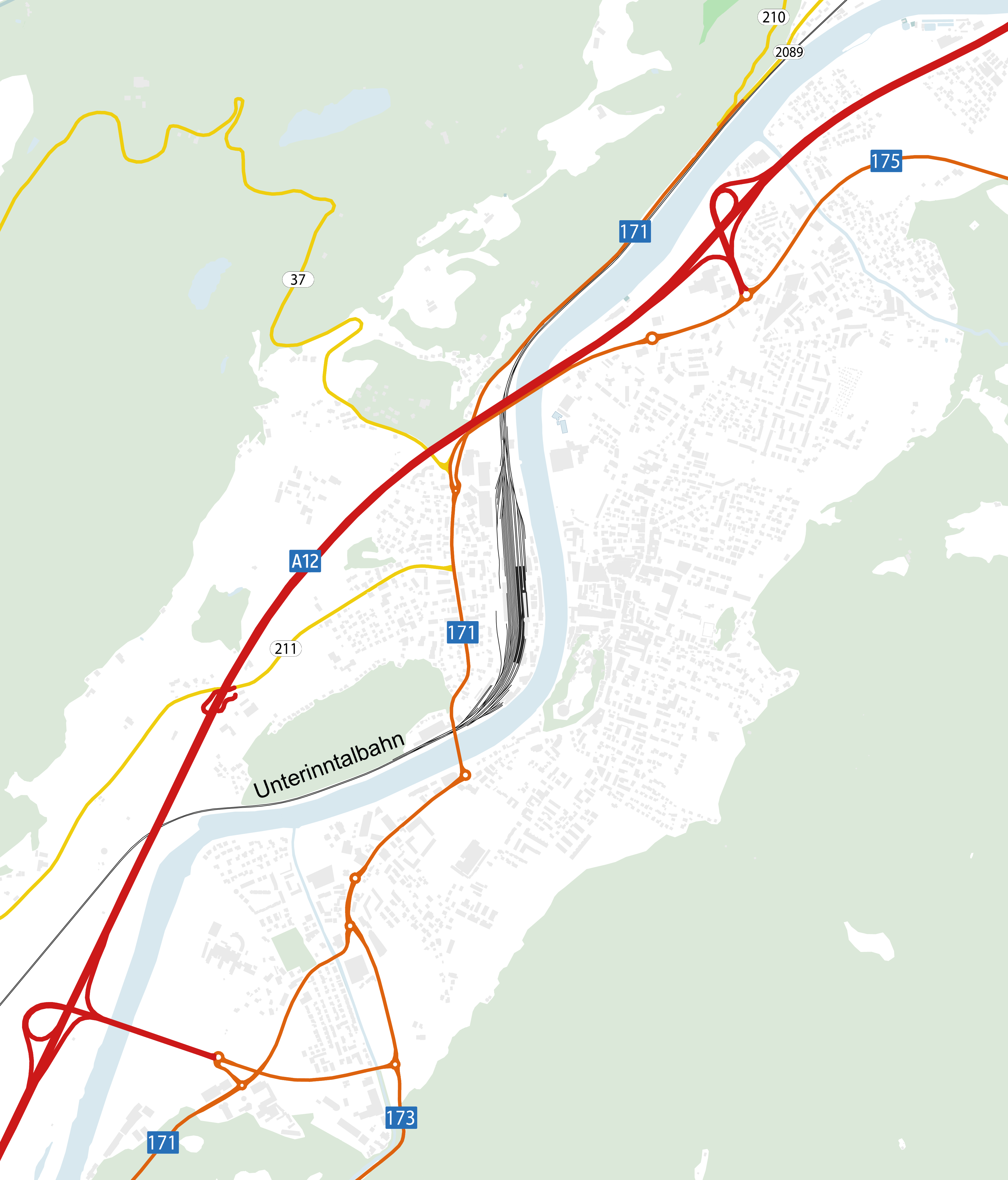 Alle hochrangigen Verkehrsverbindungen in der Stadt Kufstein, Stand 2016. Quelle